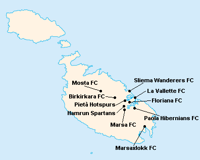 Répartition des clubs de Premier League Maltaise 2002-2003.